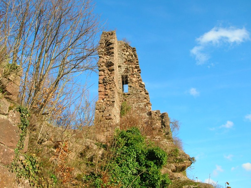 le château du Guirbaden